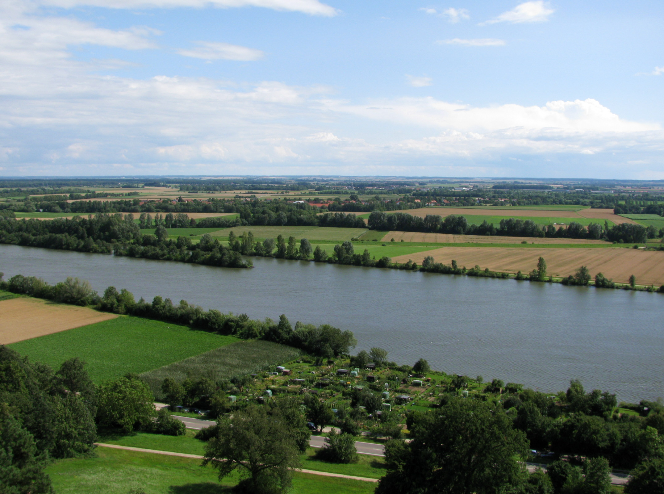 Blick von der Walhalla aus auf das Donau-Ufer